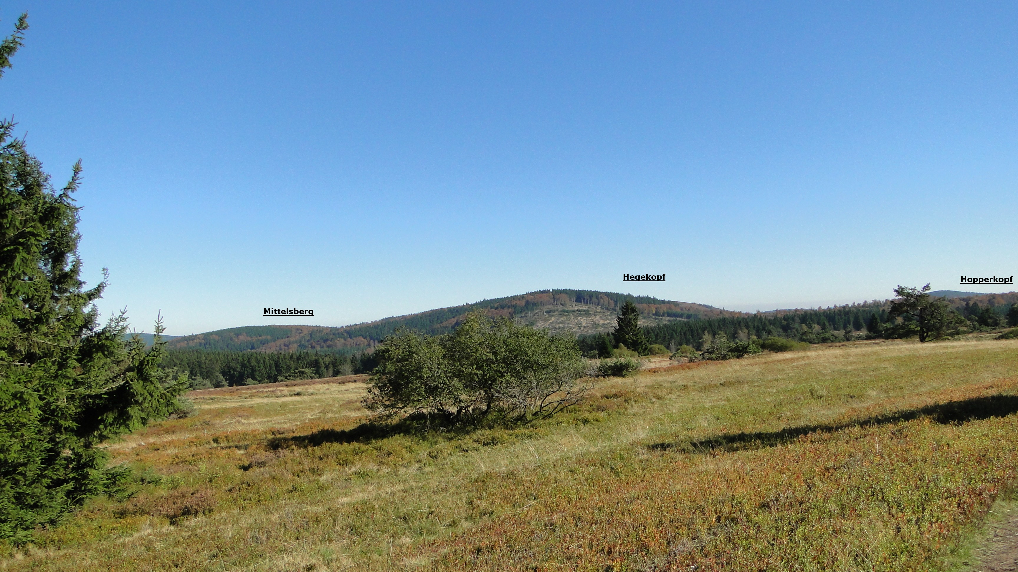 Blick von der Niedersfelder Hochheide "Neuer Hagen" (Winterberg, NRW) auf den Hegekopf und den Mittelsberg (Hessen)